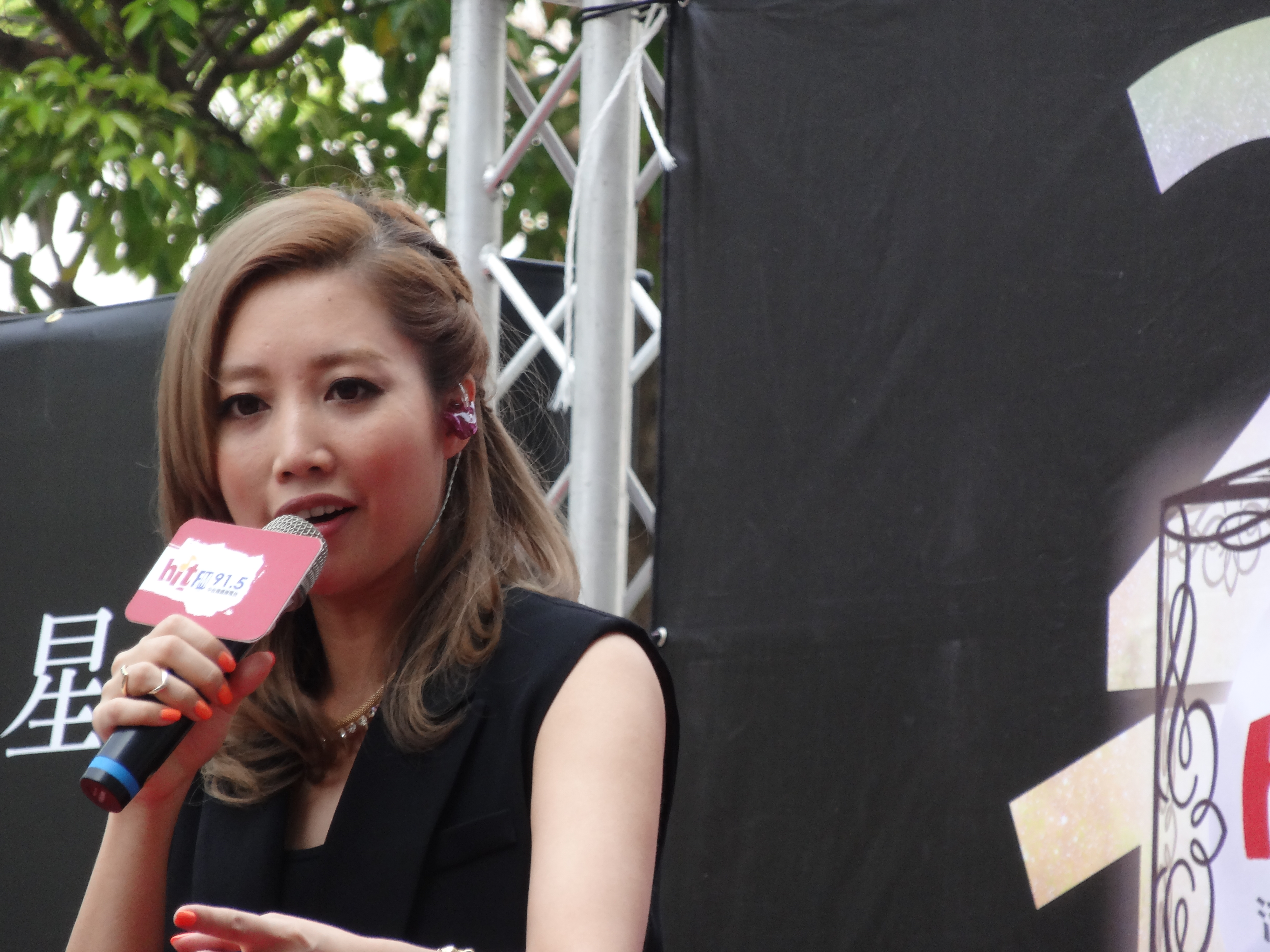 Hito流行音樂獎